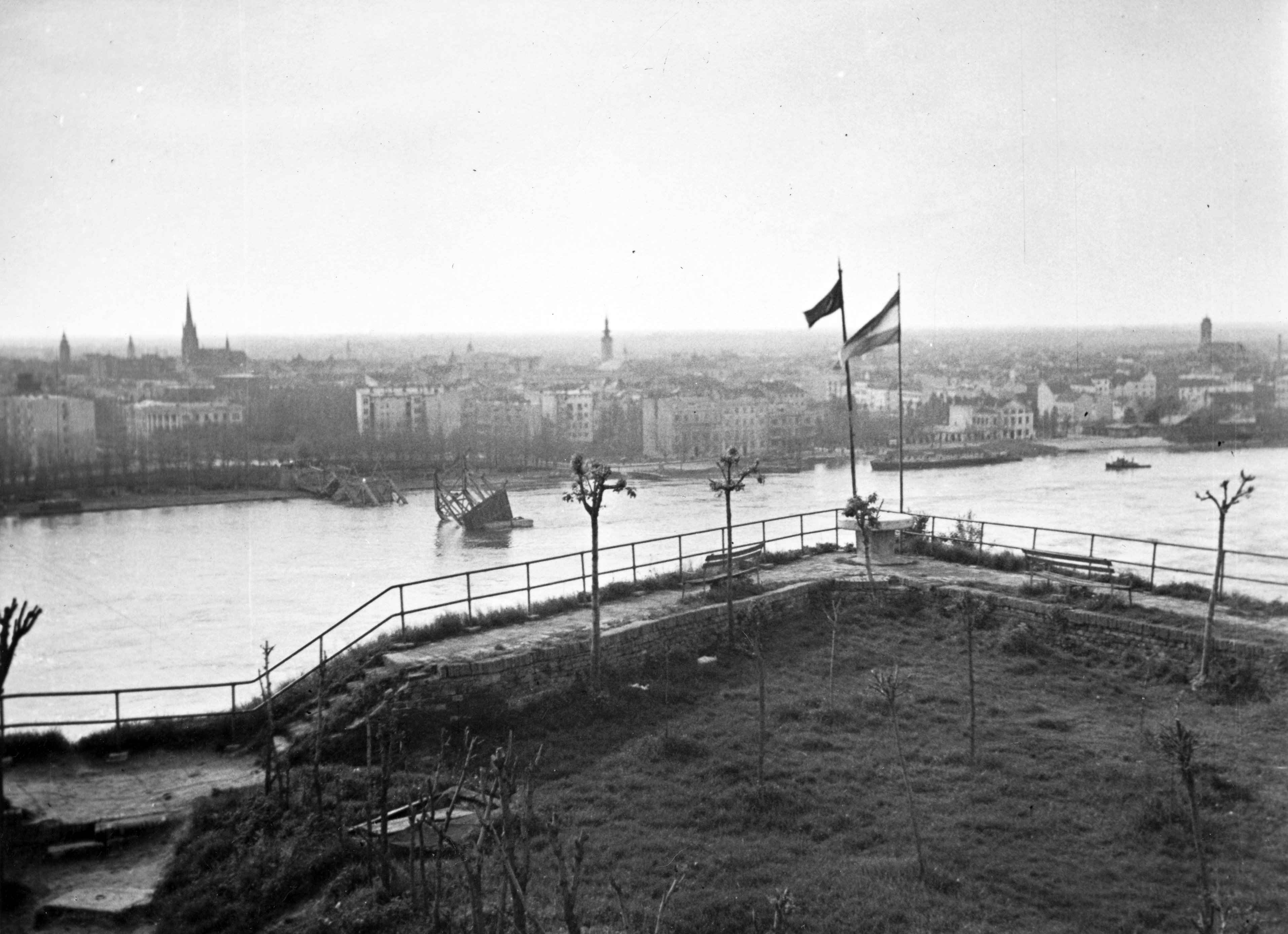 kilátás az erődből Újvidék felé. Location: Serbia, Petrovaradin Title: kilátás az erődből Újvidék felé.